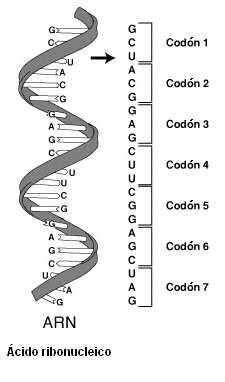 Representación de codones en una cadena de ARN.